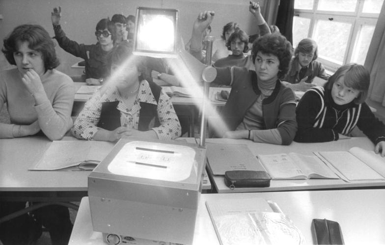 Blick in eine Berufsschulklasse ADN-ZB Link 17.6.78 mü Bez. Neubrandenburg: Lehrlinge. Für den theoretischen Unterricht stehen an der Betriebsberufsschule des VEG Walkendorf in Jördenstorf moderne Unterrichtsmittel zur Verfügung. Im Fachkabinett erwerben die künftigen Zootechniker und Mechanisatoren des 1. Lehrjahres u.a. theoretische Grundkenntnisse über Melktechnik. Zu den besten Lehrlingen gehört Annegret Kulartz (2.v.r.), die beim Bezirksvergleich der Lehrlinge ihrer Fachrichtung den vierten Platz belegte. Neben einer intensiven Grundlagenbildung erhalten die Lehrlinge - alle sind Absolventen der 10. Klasse - spezielle Kenntnisse über Rindermast, Jungviehproduktion, Schweineproduktion und Milchproduktion auf industriemäßige Art. Die berufspraktische Arbeit erfolgt entsprechend dem späteren Einsatz in industriemäßig produzierenden Milchviehanlagen.